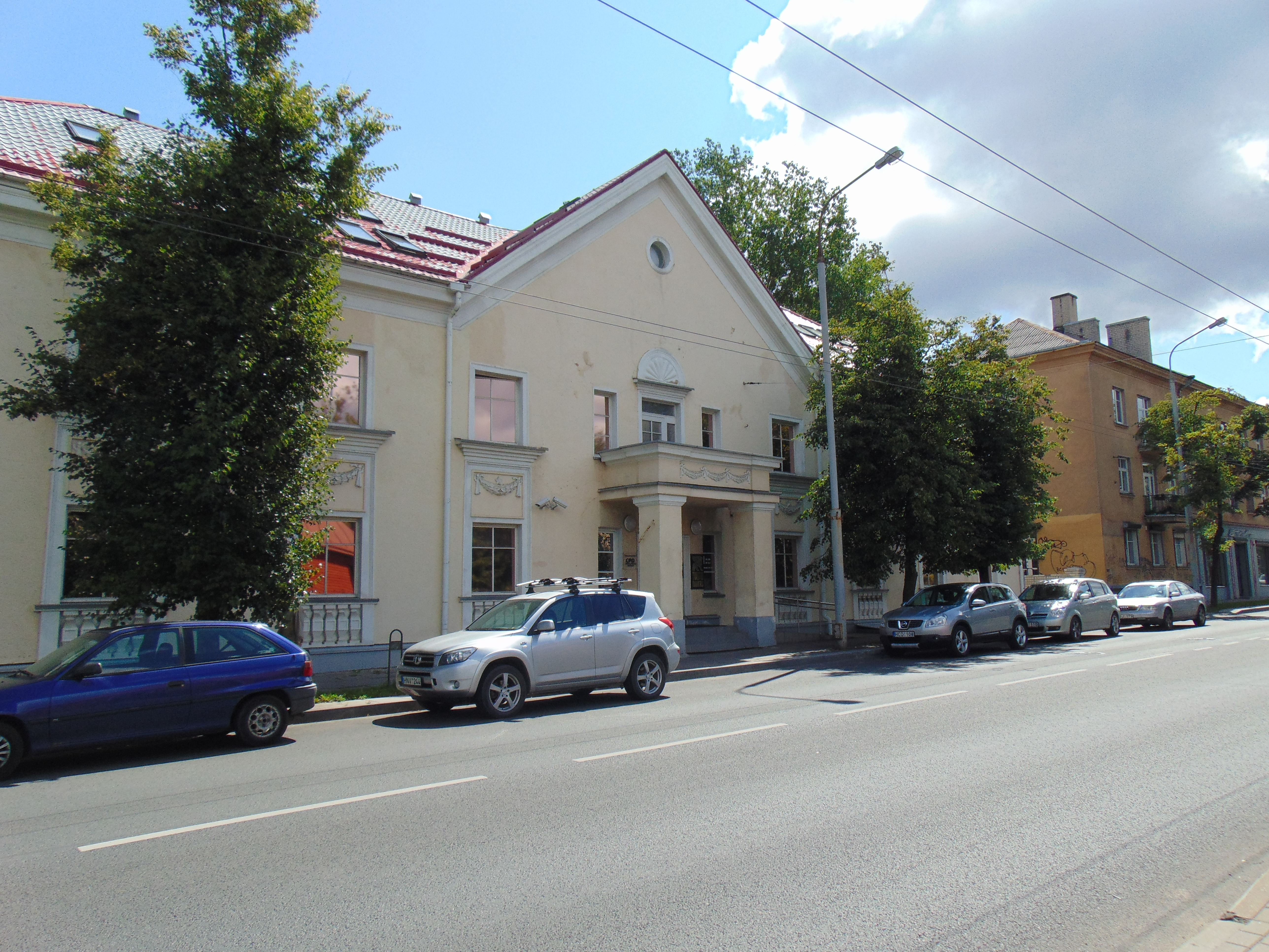 Turto banko buveinė